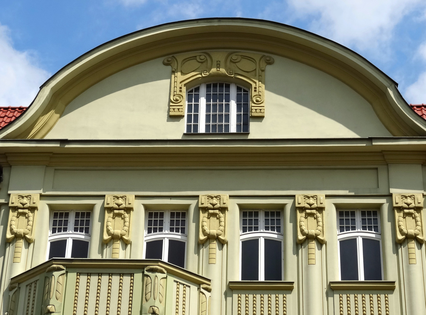 Kamienica al. Adama Mickiewicza 9 w Bydgoszczy (1904-1905, secesja, Rudolf Kern)